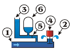 principe du bélier - 1 croquis trouvé sur Wikipedia et modifié